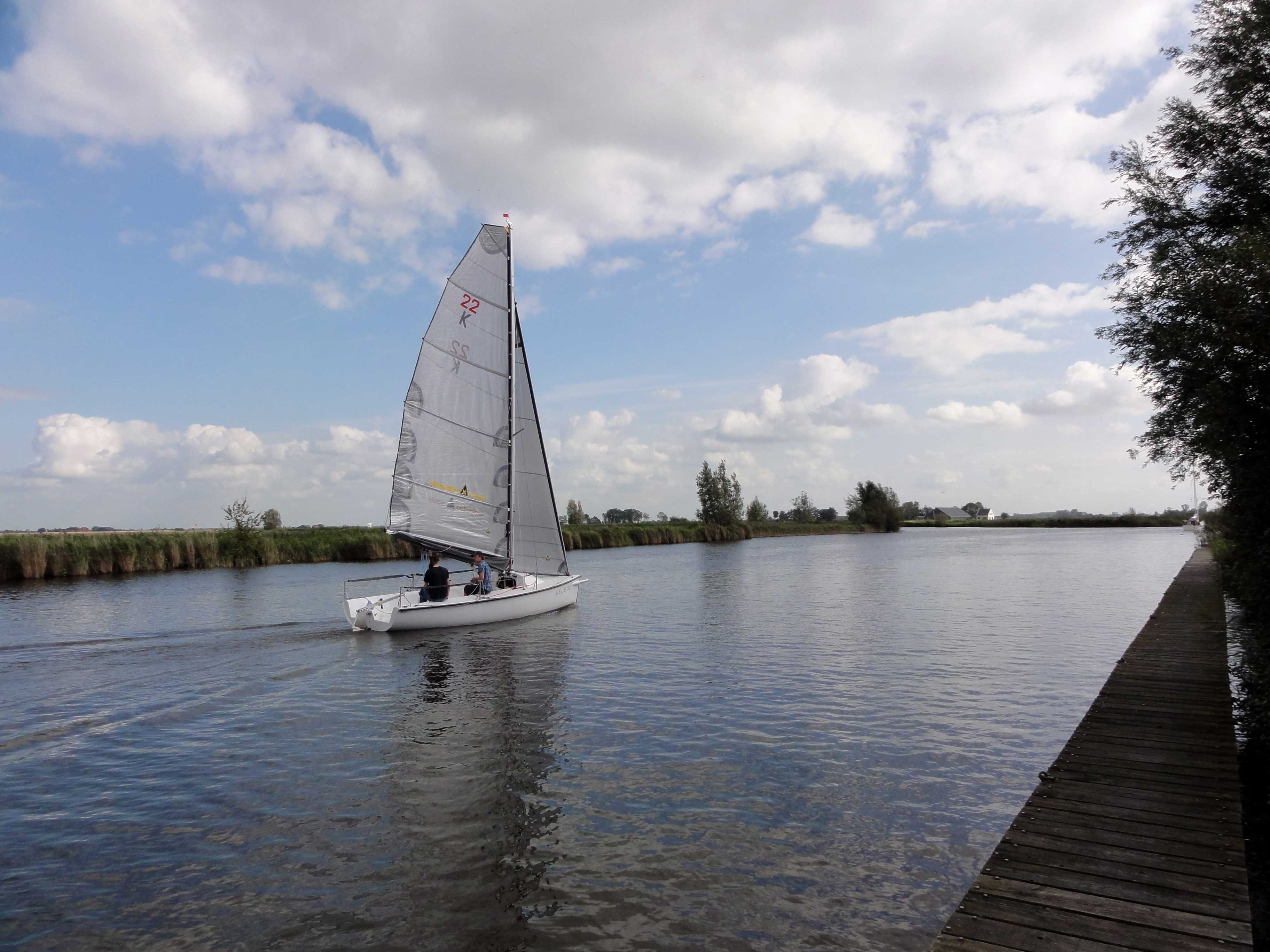 De Ee nabij Sloten